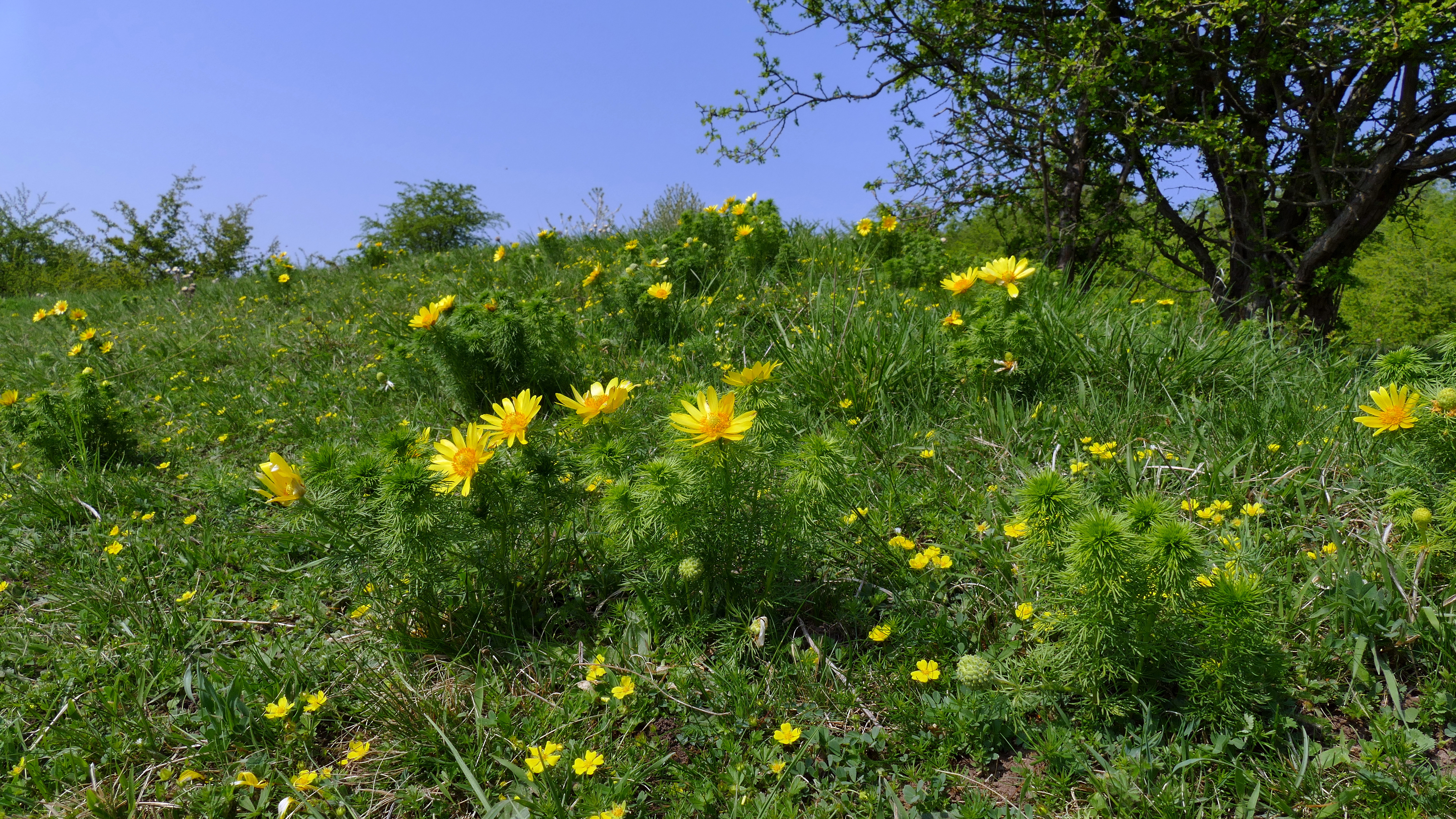 Die Blüte des Frühlings-Adonisröschens oder Frühlings-Adonis (Adonis vernalis) im Naturschutzgebiet Heeseberg lockt im Frühjahr viele Menschen an. Hier ist im Vordergrund das Frühlings-Fingerkraut (Potentilla neumanniana, Synonym: Potentilla verna) zu sehen. Das Naturschutzgebiet ist Teil des FFH-Gebietes 111 (Heeseberg-Gebiet) und ist daher Bestandteil des europäischen Netzes "Natura 2000".